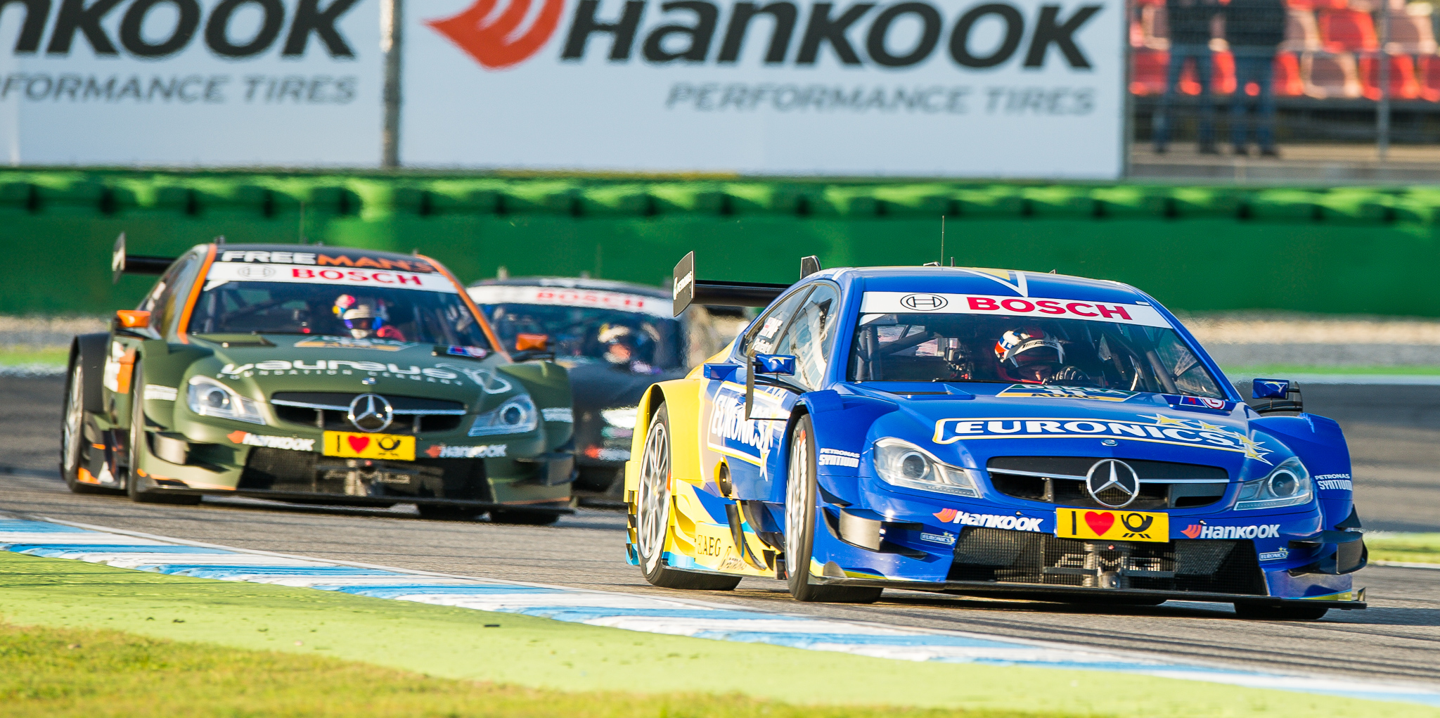 Abt Sportsline GmbH,Adrien Tambay,DTM,Deutsche Tourenwagen Masters,EURONICS Mercedes AMG C-Coupe,FREE MAN'S WORLD Mercedes AMG C-Coupe,Gary Paffett,HWA AG,Hockenheimring,Motorsport,Playboy Audi RS 5 DTM,Robert Wickens